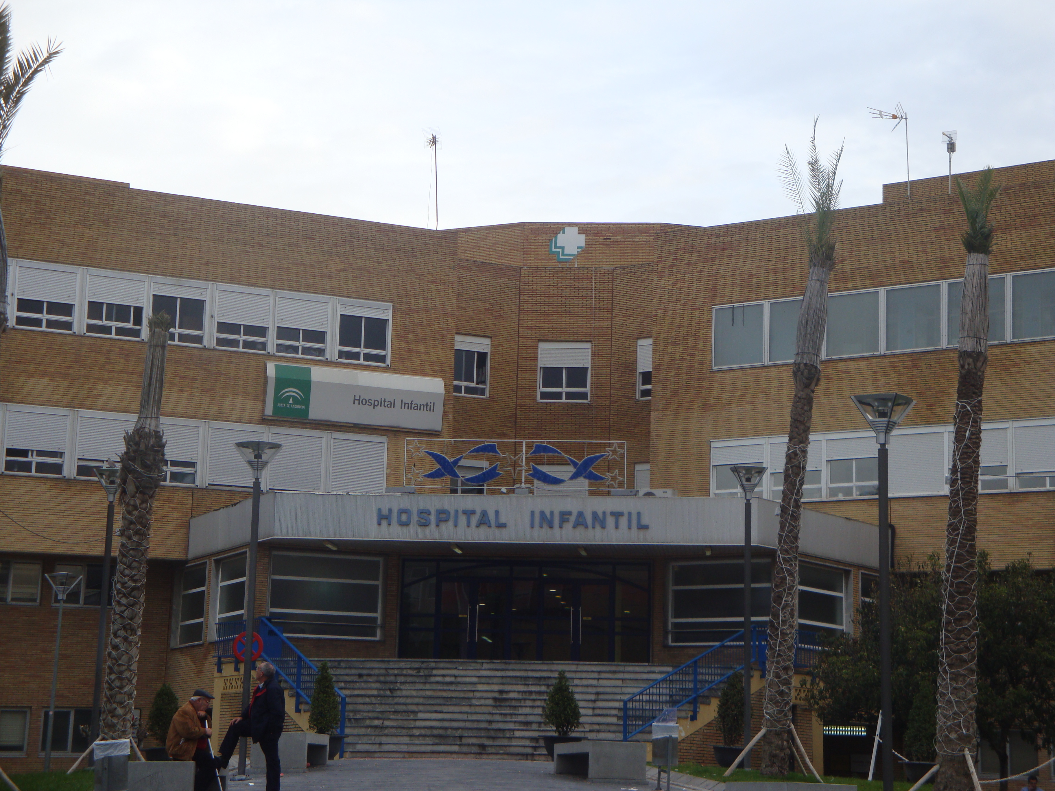 Hospital infantil de Sevilla